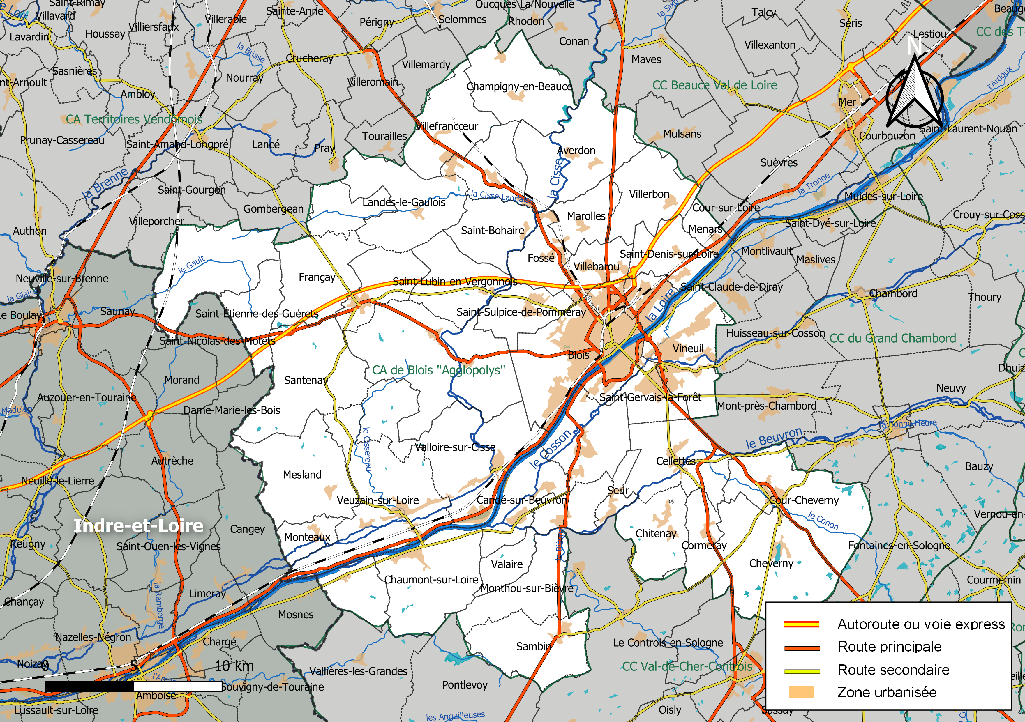 Carte de la communauté d'agglomération de Blois « Agglopolys », département de Loir-et-Cher, France. Composition au 1er janvier 2019.